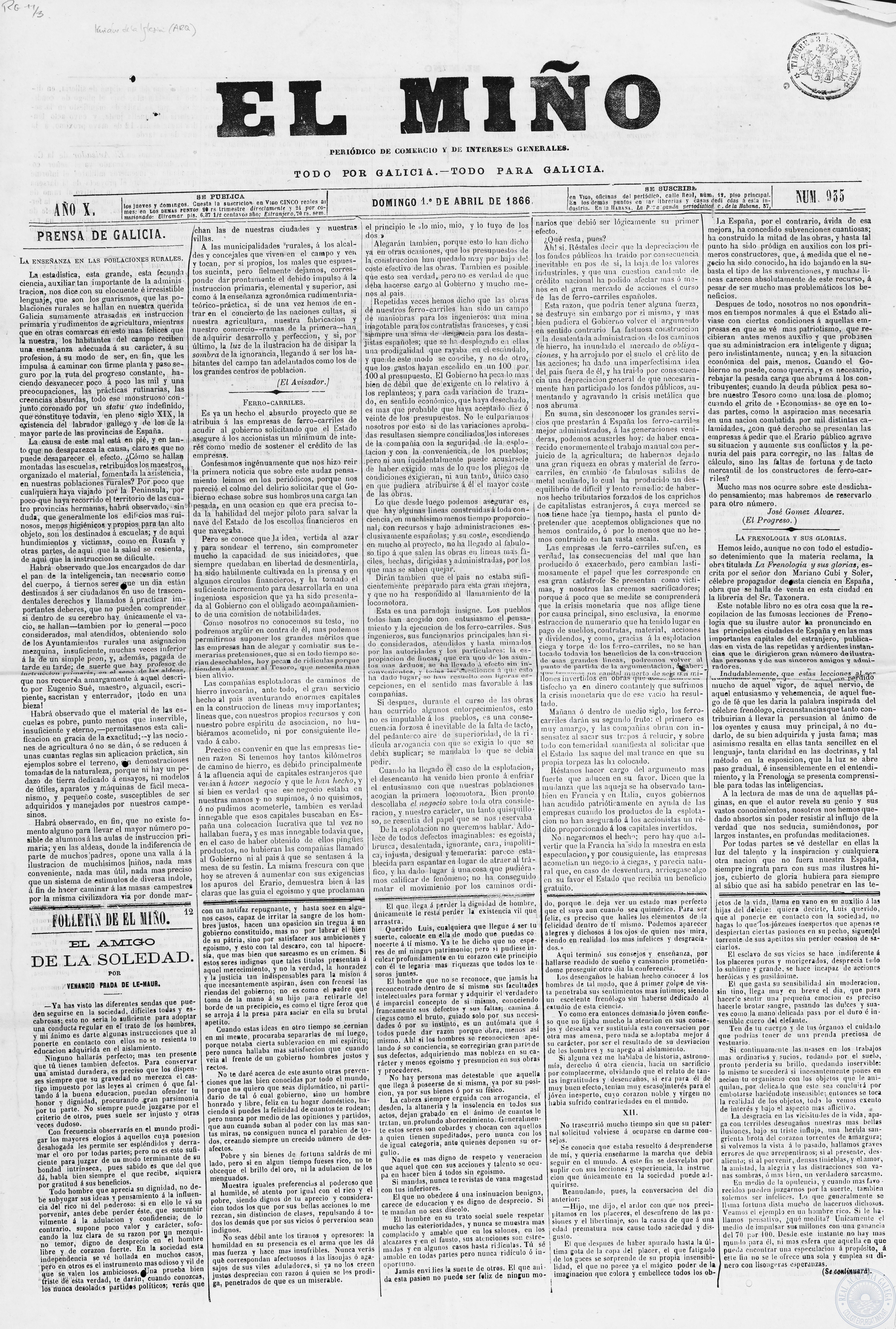 El Miño, periódico, 1 abril 1866, número 935, Vigo